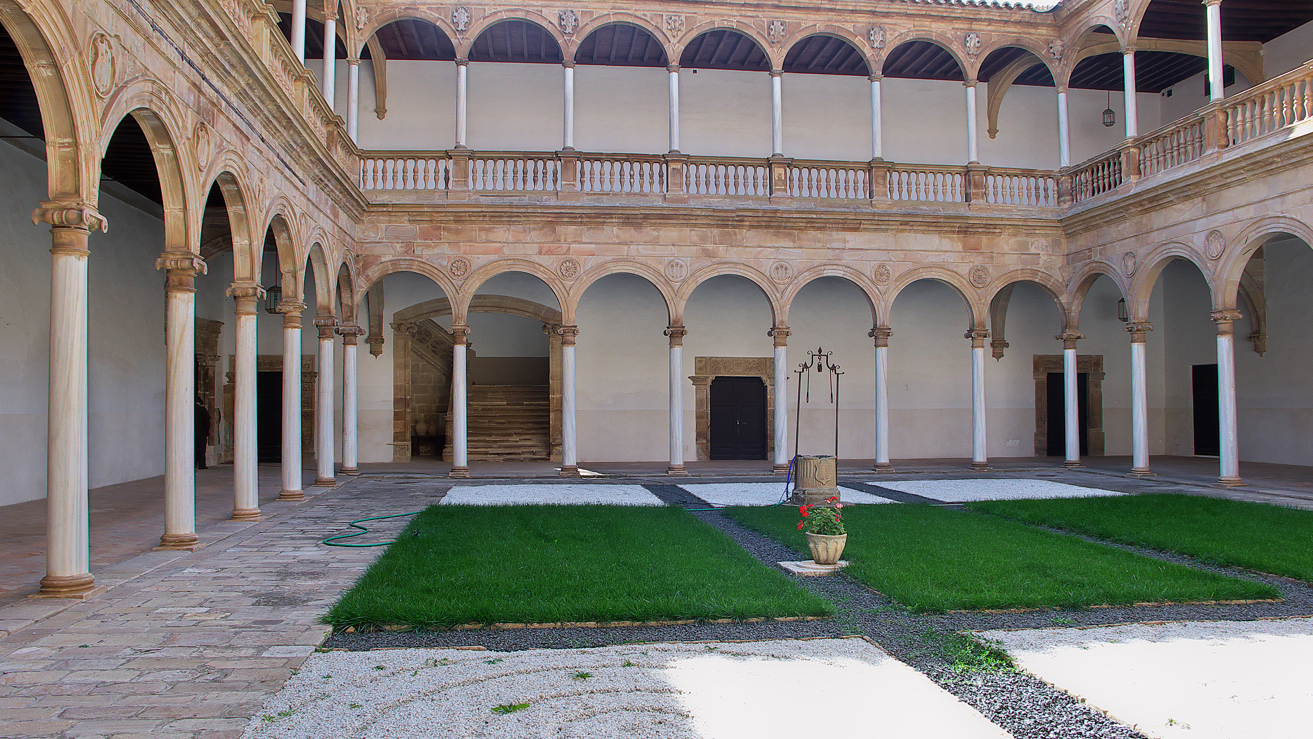 Enrique Egas el Mozo, hijo y sobrino de los famosos Egas, formado por Alonso de Covarrubias, aporta a la Orden de Calatrava uno de los grandes claustros renacentistas de España (1548).